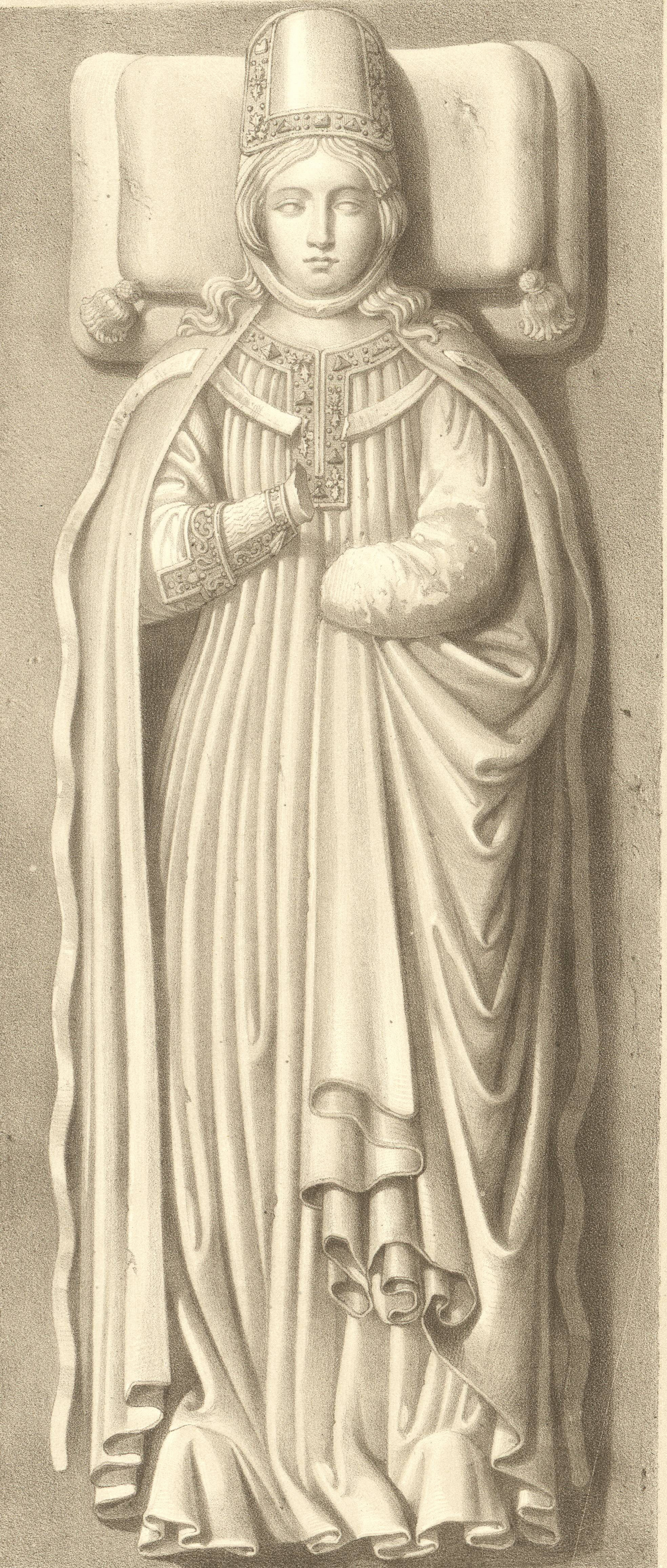 Dibujo sobre la estatua yacente de Mencía López de Haro en su sepulcro en Santa María la Real de Nájera.